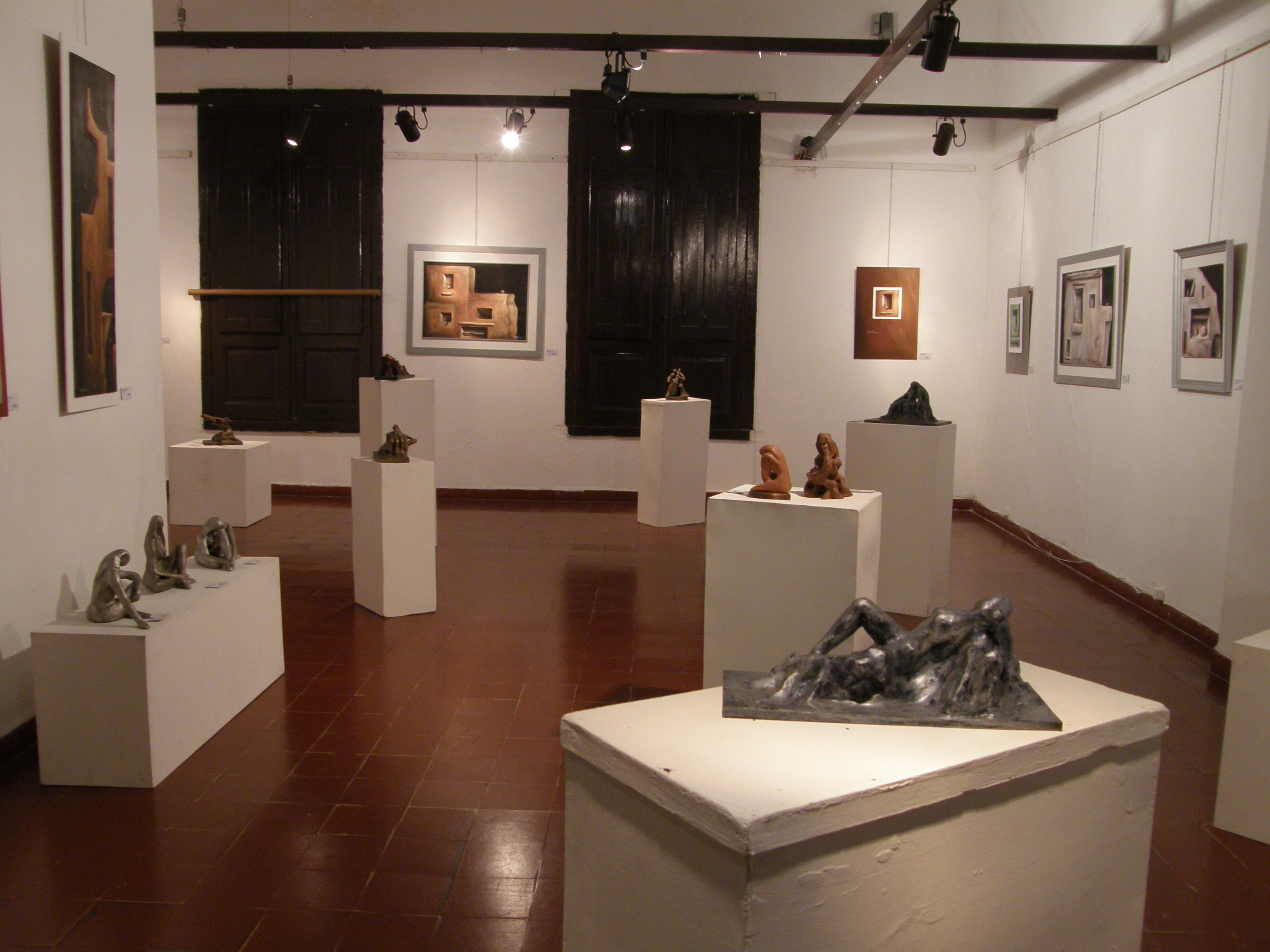 Sala de exposiciones itinerantes, en este caso del artista plástico maragato Alejandro Pérez Noya, quien también enseña en el Museo